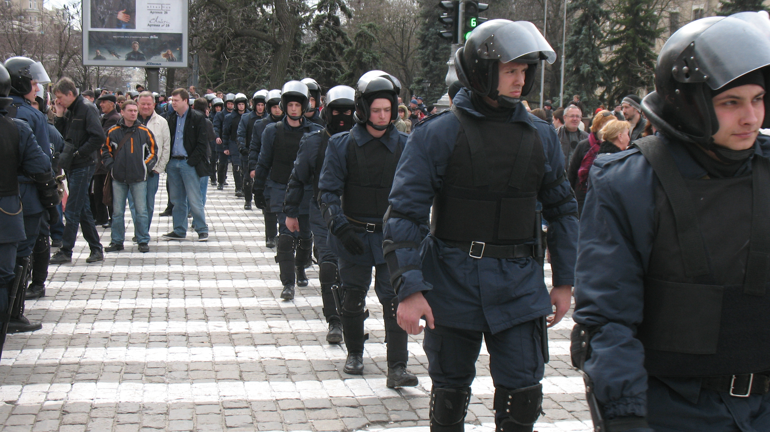 Люди в новой форме спецназа МВДУ, шлемах и бронежилетах без единого опознавательного знака (шевронов, кокард, нашивок, погон, надписей) (колонна справа) перед штурмом ХОГА. Идут снизу вдоль Сумской, образуя внешнее кольцо оцепления вокруг ХОГА на площади. День 7 апреля 2014.